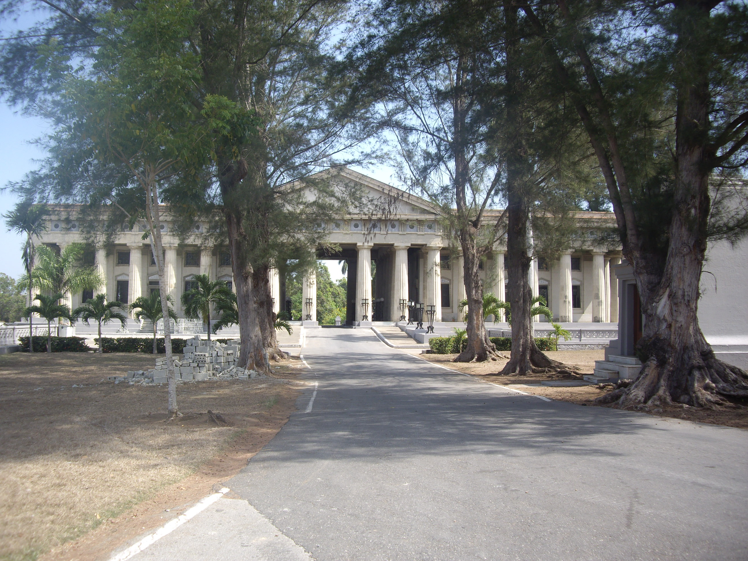 Edifici central del cementiri Tomás Acea des de l'interior del cementiri. Cienfuegos, Cuba